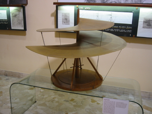 Maquette de la Vis Aérienne de Léonard de Vinci - Galerie Léonard de Vinci - Musée des sciences & technologies Léonard de Vinci de Milan - Italie